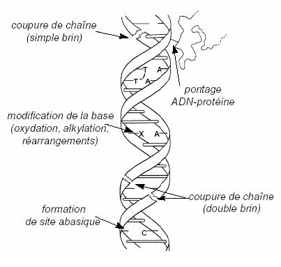 exemples de mutations possibles sur l'ADN